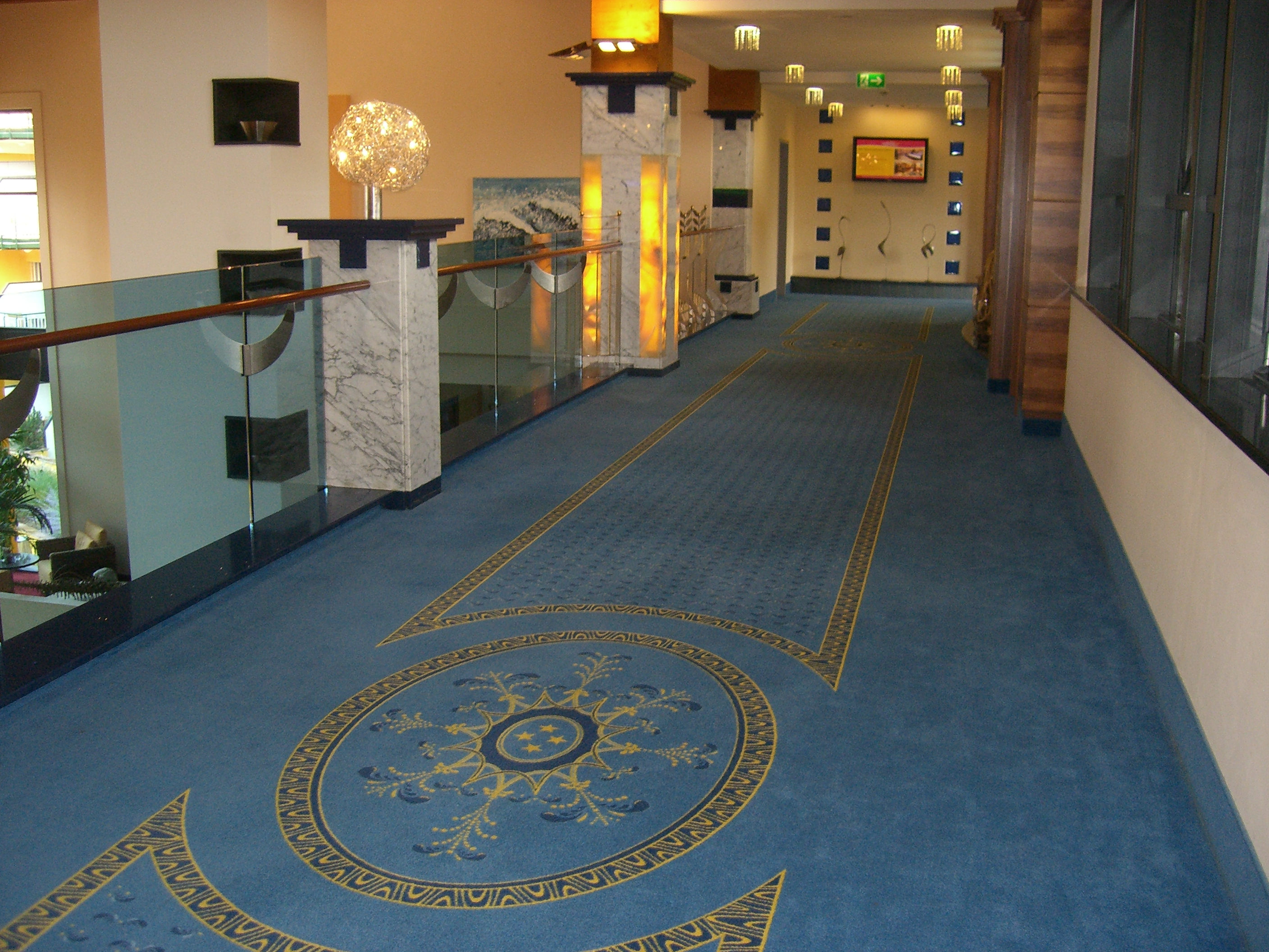 Eurotherme Bad Schallerbach, Hotel Paradiso